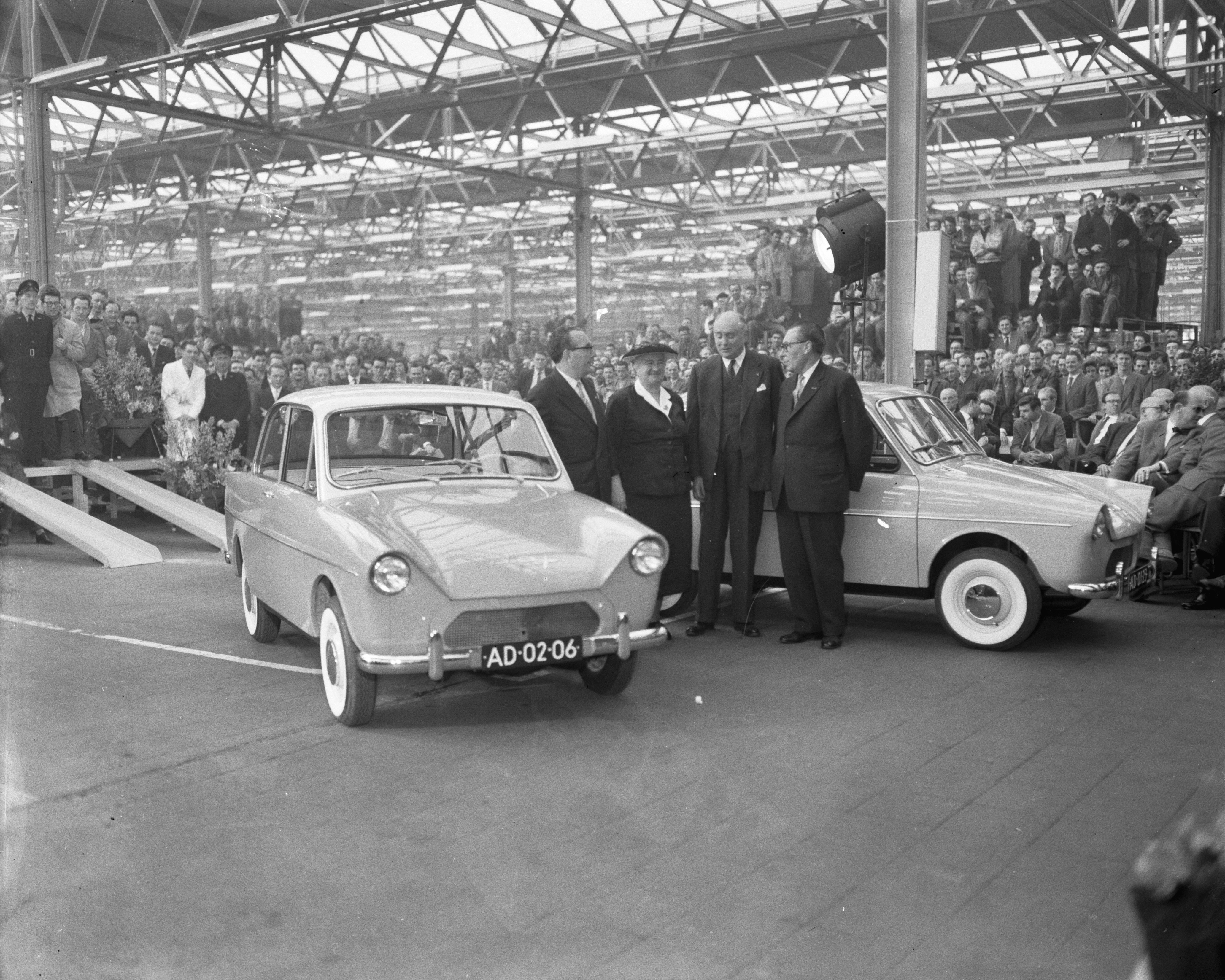 Collectie / Archief : Fotocollectie Anefo Reportage / Serie : [ onbekend ] Beschrijving : Eerste DAF personenauto is van de band gekomen in Eindhoven, v.l.n.r. Huub Van Doorne , mr. jhr. Smits Van Oyen Van Eckart , mevrouw Smulders Datum : 23 maart 1959 Locatie : Eindhoven Trefwoorden : banden Instellingsnaam : DAF Fotograaf : Bilsen, Joop van / Anefo Auteursrechthebbende : Nationaal Archief Materiaalsoort : Negatief (zwart/wit) Nummer archiefinventaris : bekijk toegang 2.24.01.04 Bestanddeelnummer : 910-2389